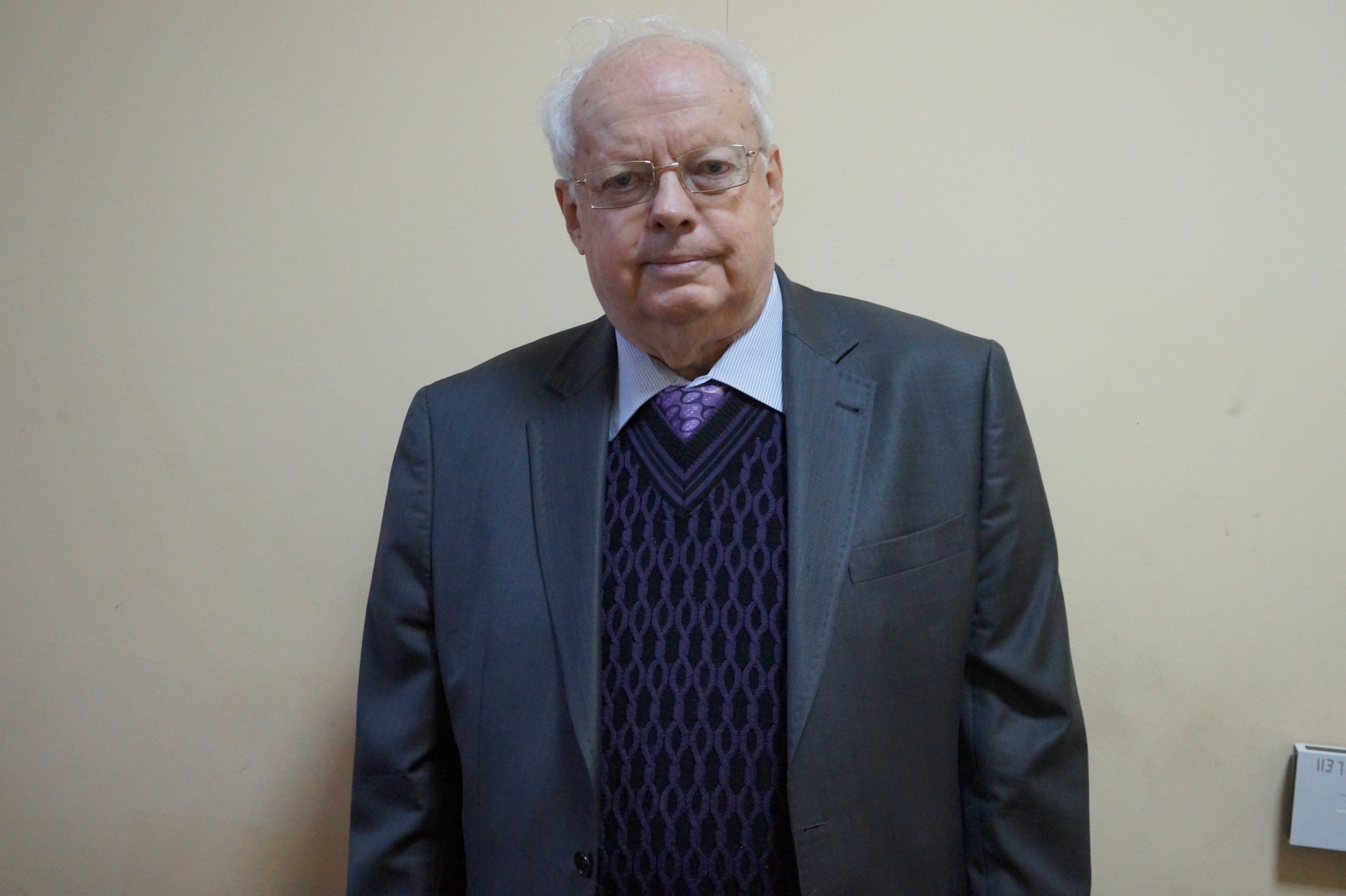 Мирослав Скорик а НМАУ ім.Чайковського